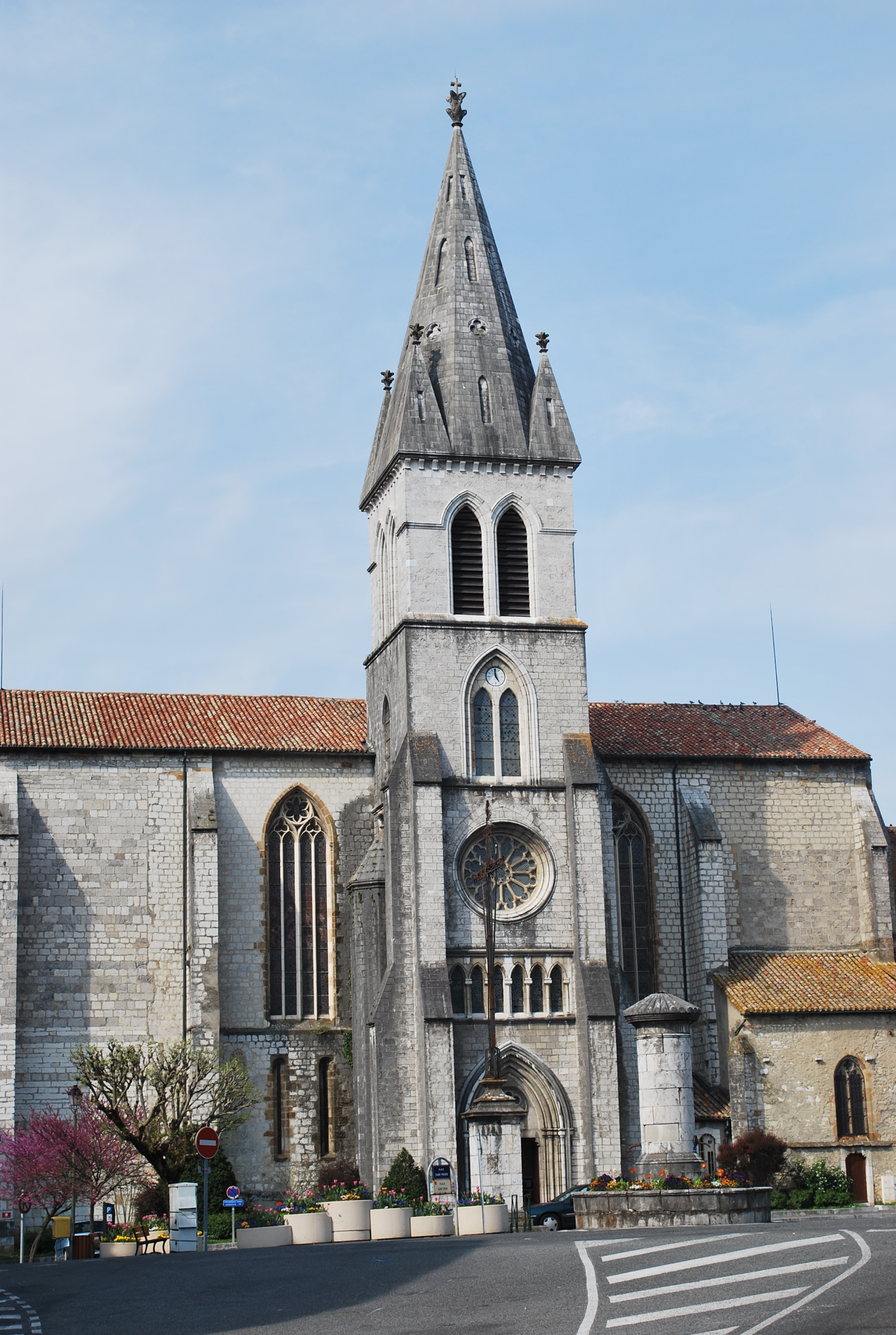 Eglise d'Orthez (Pyrénées-Atlantiques).